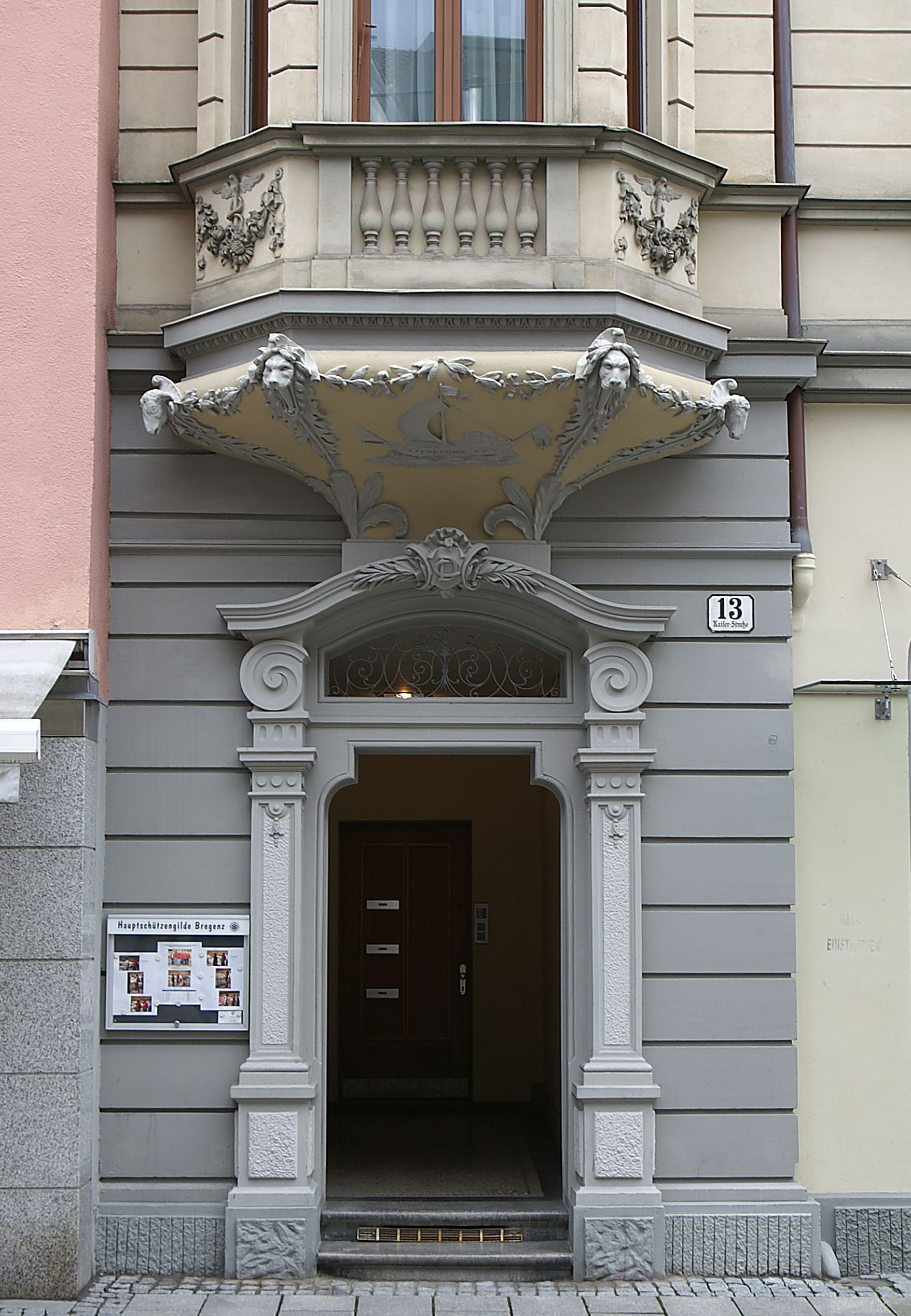 aus dem DEHIO Vorarlberg 1983: Kaiserstrasse Nr.13 Reichgestaltete Putz- und Klinkerfassade (bezeichnet 1902) seitlicher Erker mit Knickgiebel, Blendbaluster. Portalöffnung mit Schulterbogen, historistischer Dekor in Renaissance- und Rokokoformen. *** In Bregenz.